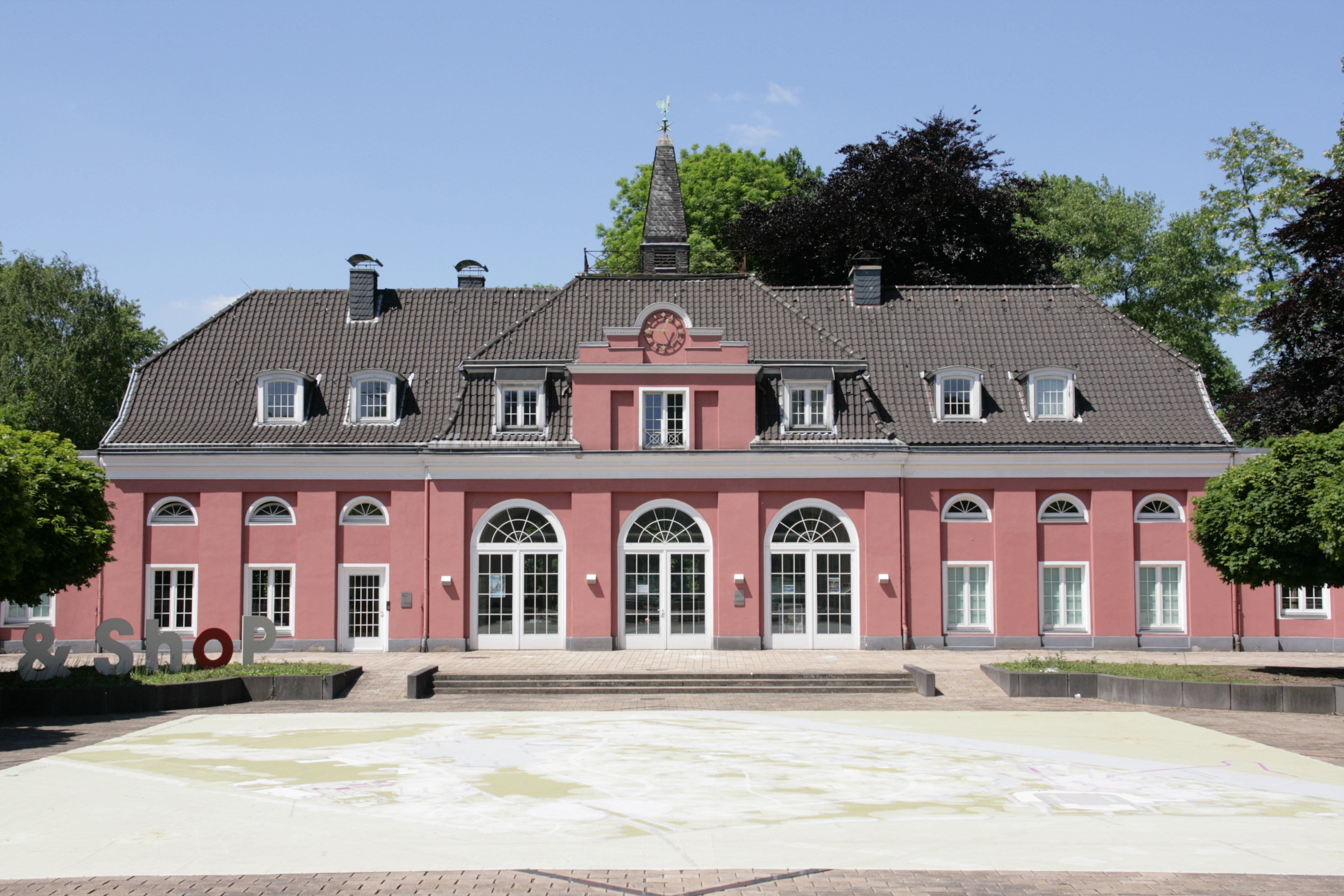 Schloss Oberhausen im Kaisergarten / an der Konrad-Adenauer-Allee in Oberhausen